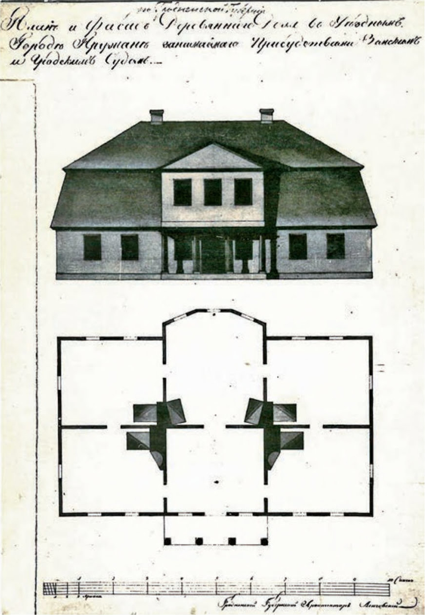 Беларуская (тарашкевіца): Пружаны (Pružany). Будынак земскага і гродзкага судоў, абмеры